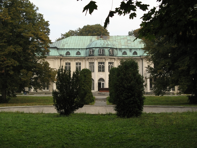 Zámek Slapy, Slapy 55, jižní část obce